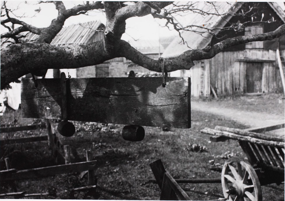 Julius Brus, lokulaud tulekahju signaaliabinõuna